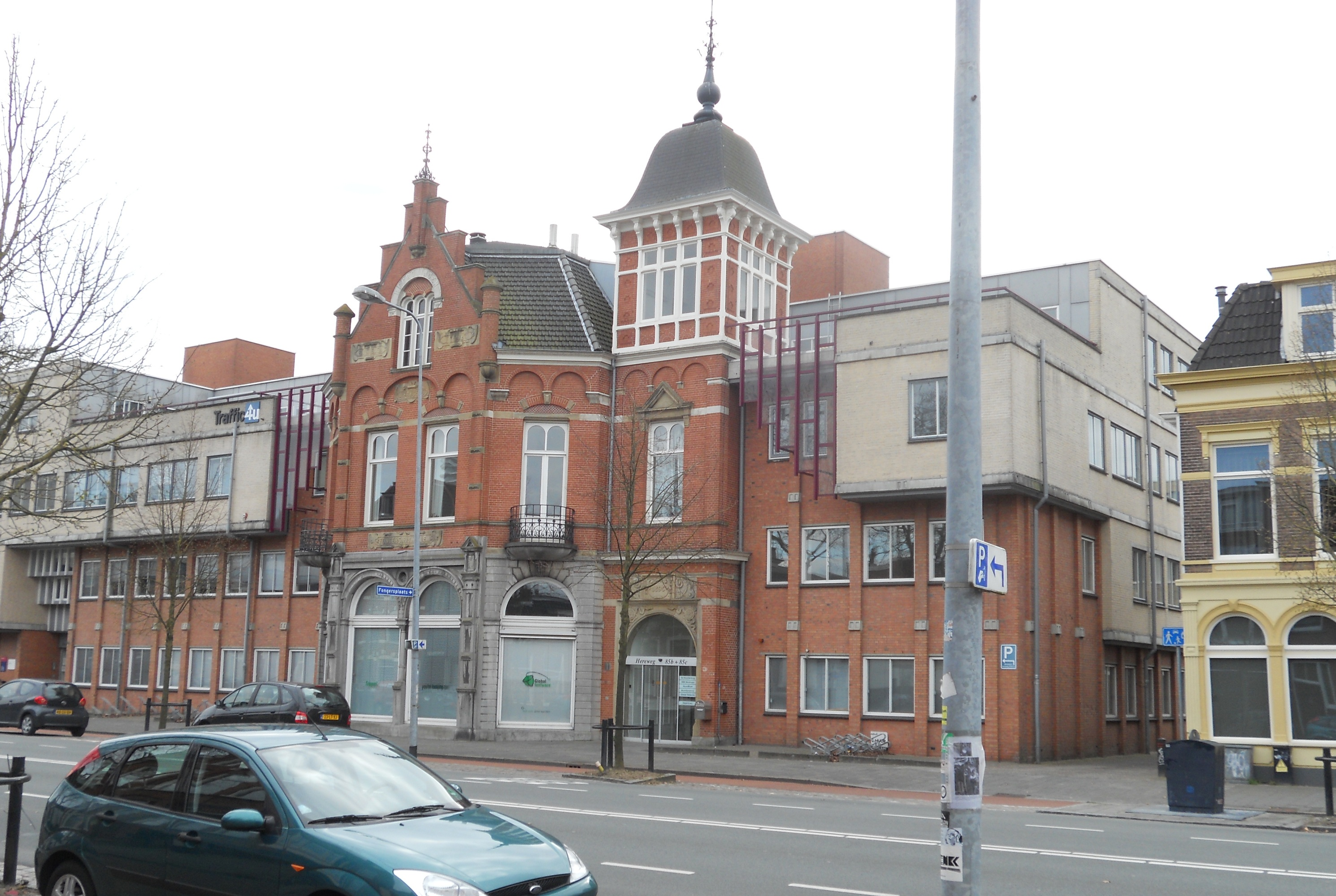 De voormalige fietsenfabriek van Fongers aan de Hereweg in Groningen